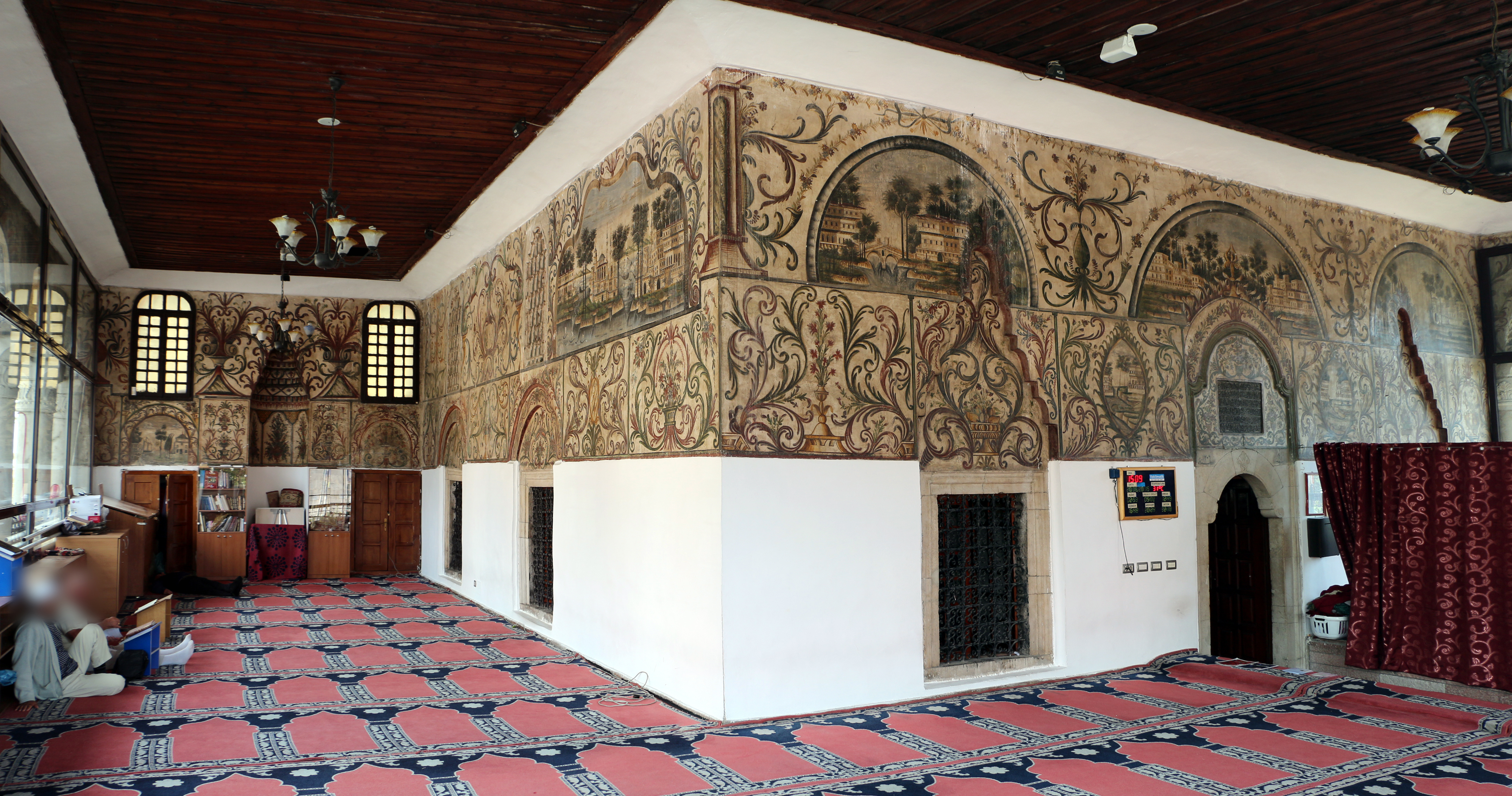 Xhamia e Ethem Beut